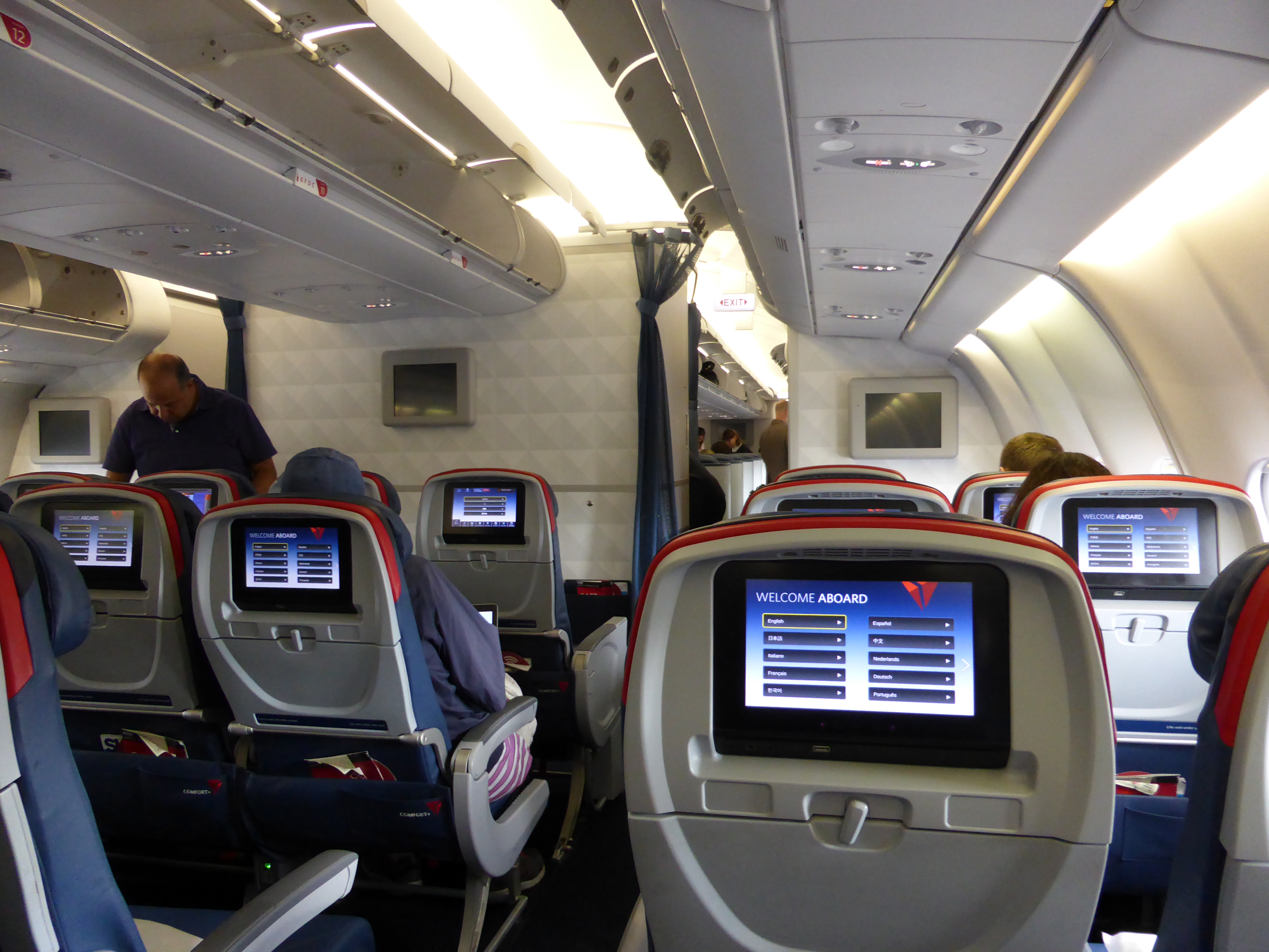 Système multimédia à bord d'un airbus A330-300 de Delta